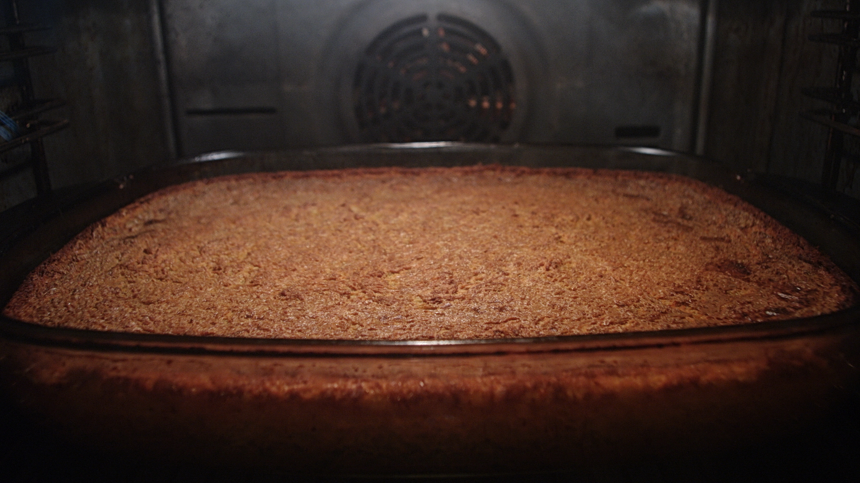 Iškepęs bulvių plokštainis, kepė 2 val 30 min